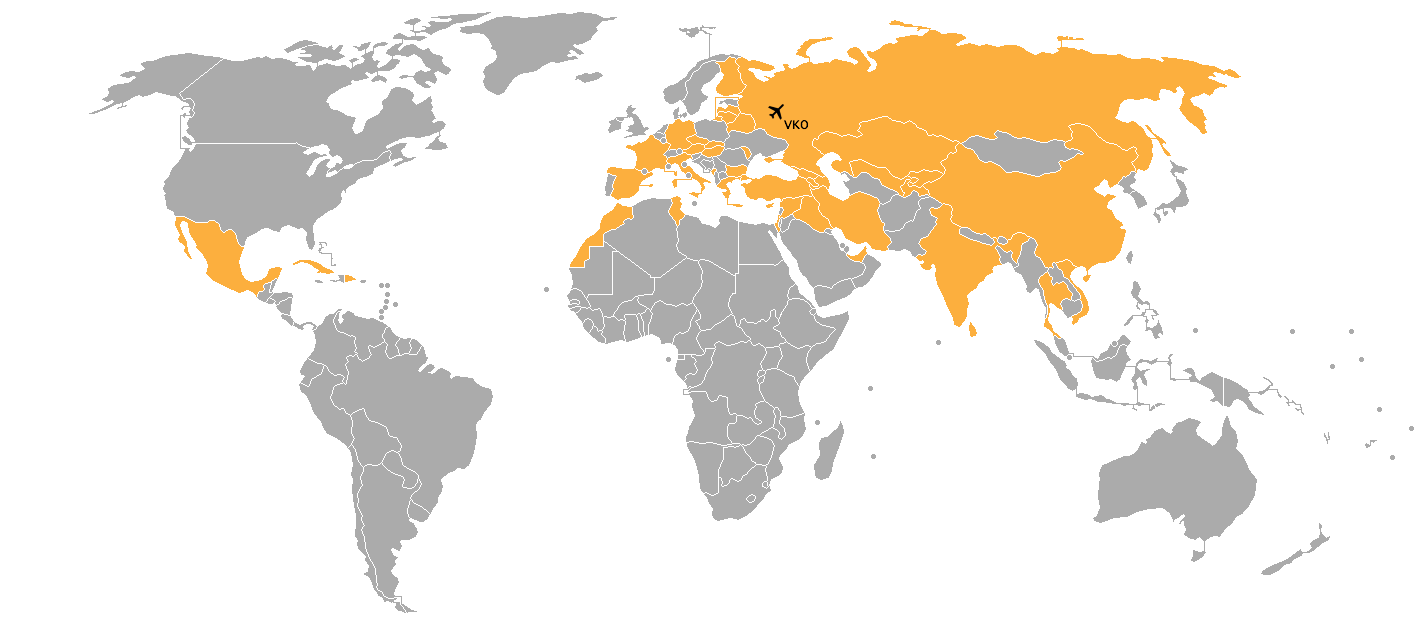 Карта стран, в которые выполняются пассажирские авиарейсы их международного аэропорта Внуково.